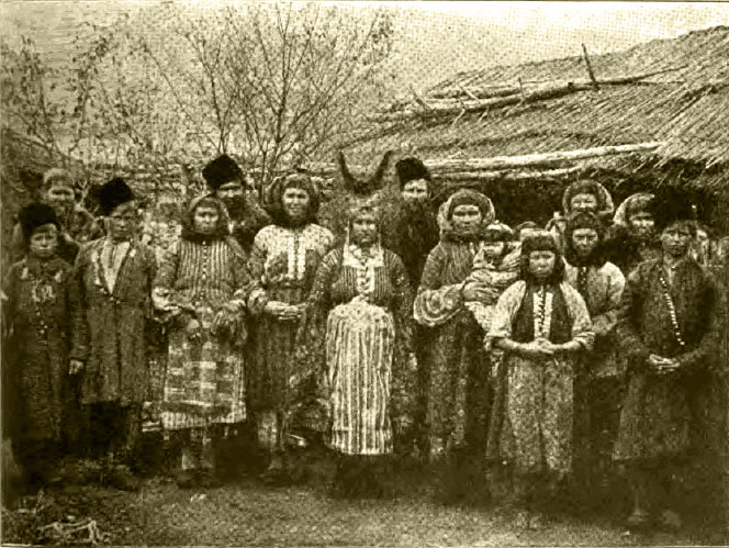 Некрасовские казаки и казачки. В центре женщина в рогатой кичке. Некрасовские казаки в конце XVII века ушли сначала на Кубань, а потом в Малую Азию. Фото 1895 г.